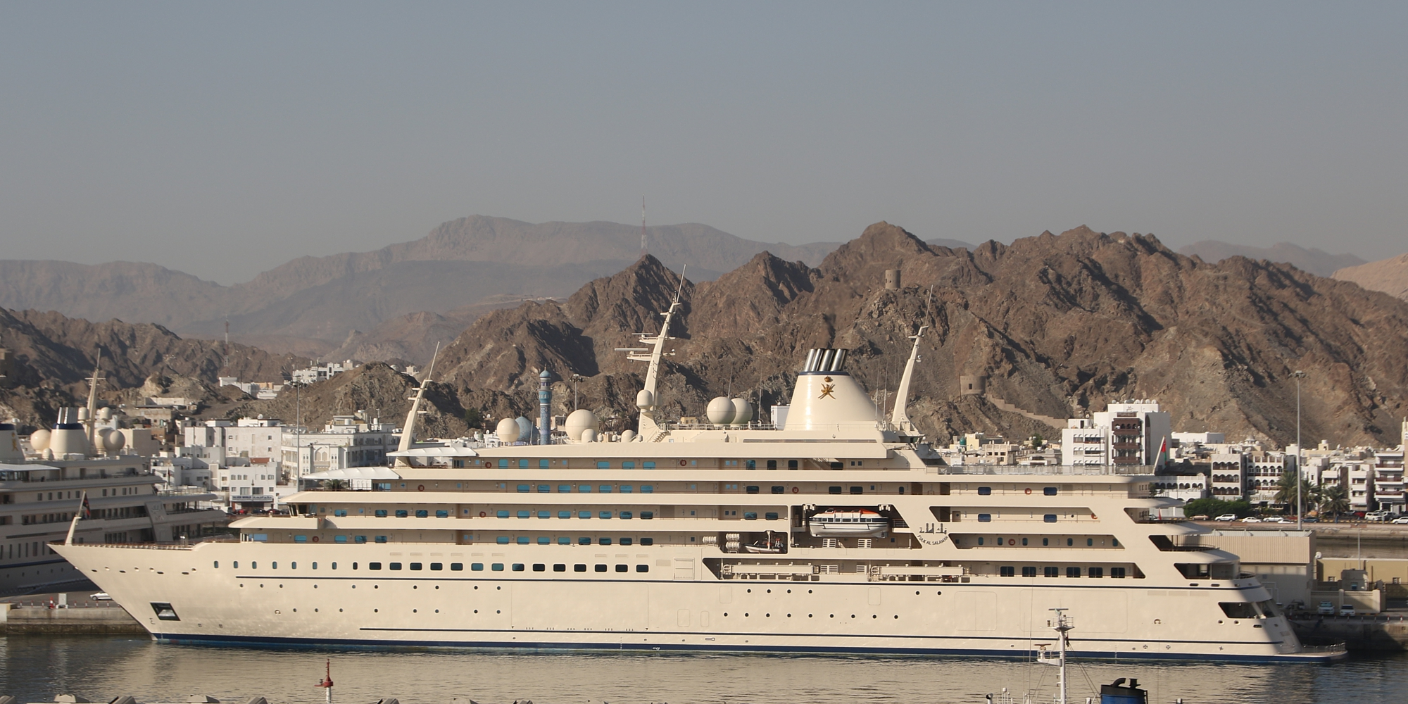 Die Privatjacht des Sultans Qabus im Sultan-Qaboos-Hafen in Mutrah (Muskat)